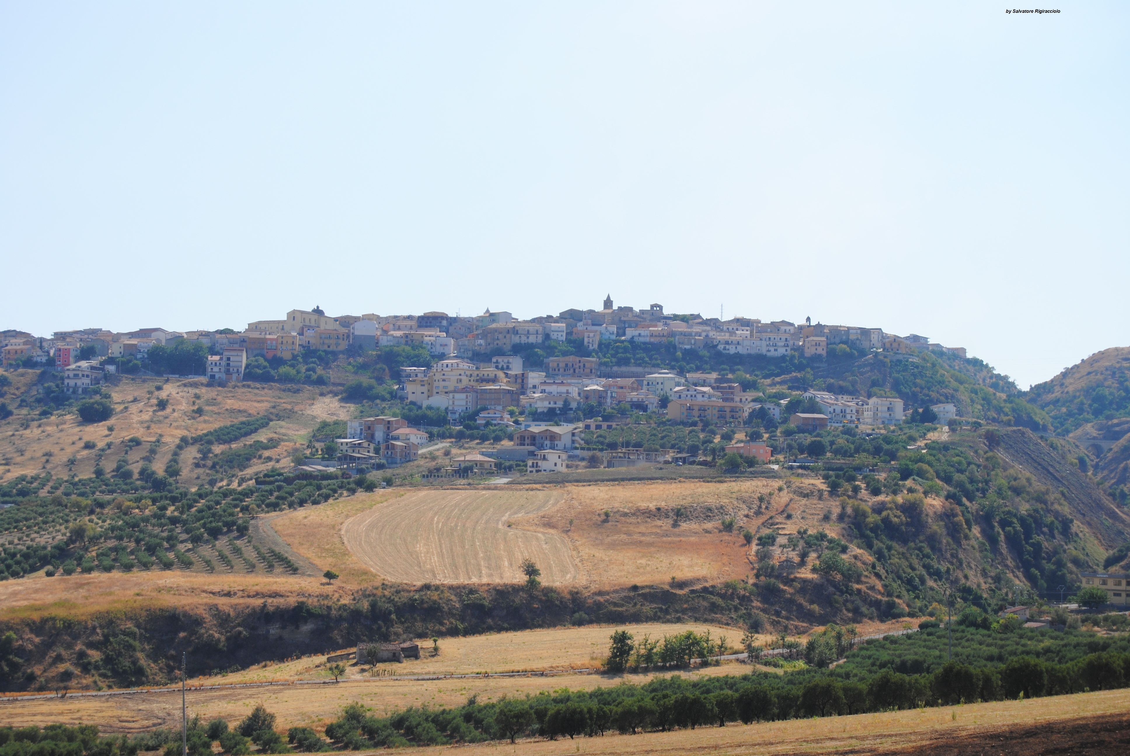 Vista di Terranova da Sibari - Vista panoramica, Foto scattata da Salvatore Rigiracciolo nel mese di agosto 2012